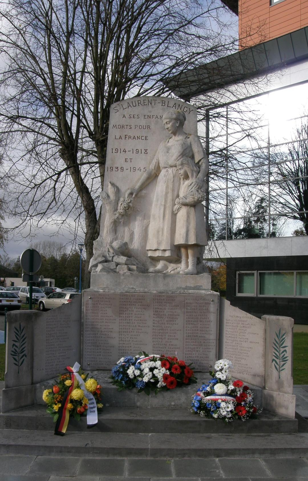 Saint-Laurent-Blangy (Pas-de-Calais, France). Le monument-aux-morts.